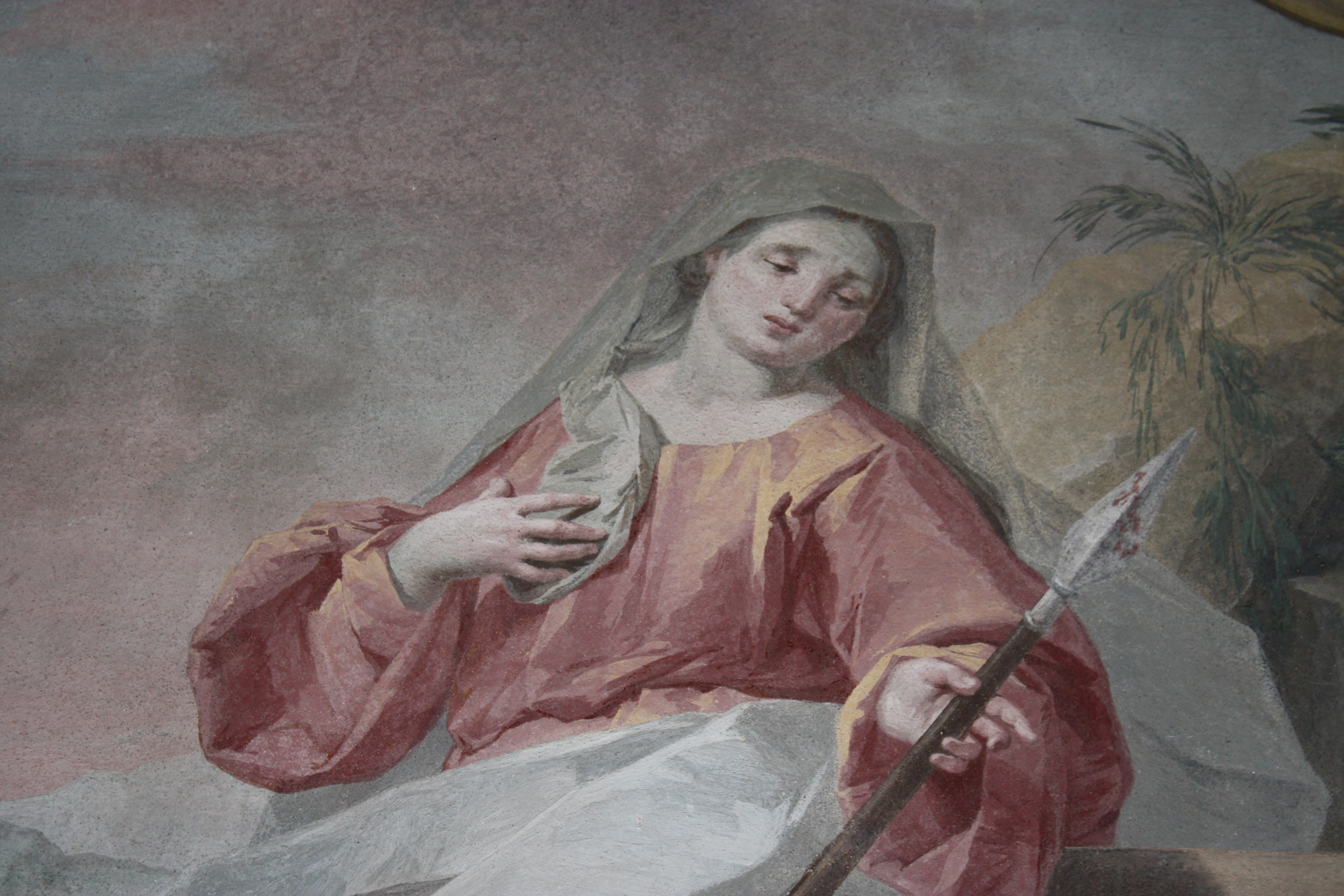 Dettaglio dell'affresco raffigurante l'Addolorata, opera di Biagio Bellotti post 1762 presso l'oratorio della Confraternita del Santissimo Sacramento di Solaro (MI).